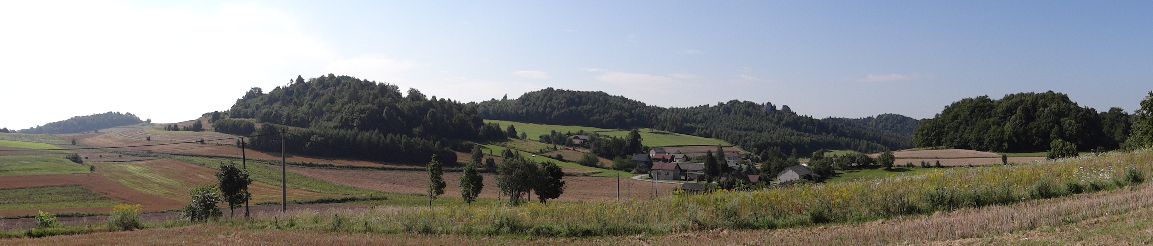 Dolina osady Podlesie w Smoleniu